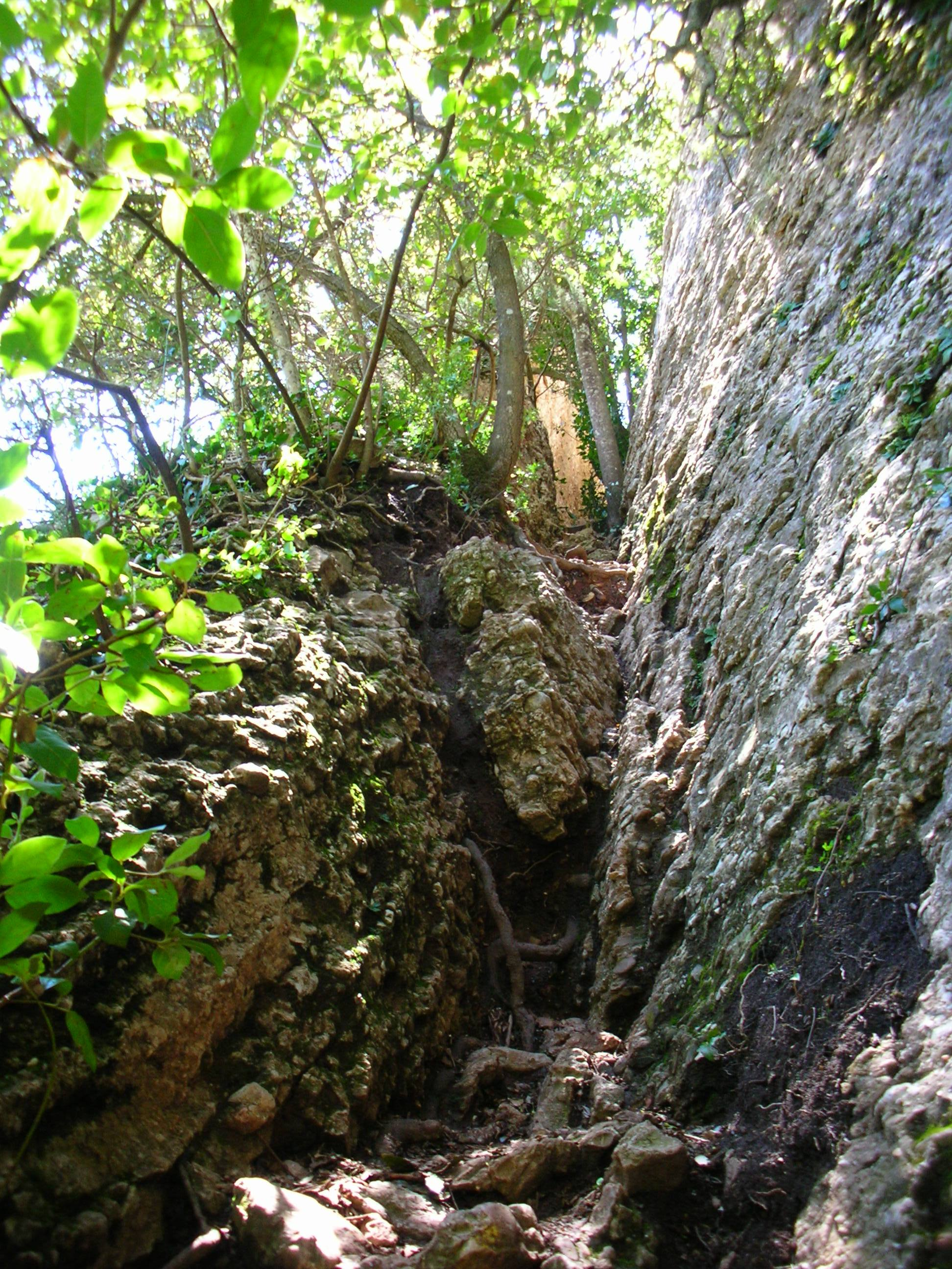 Canalet que puja al Montgròs des del Canal de Migdia